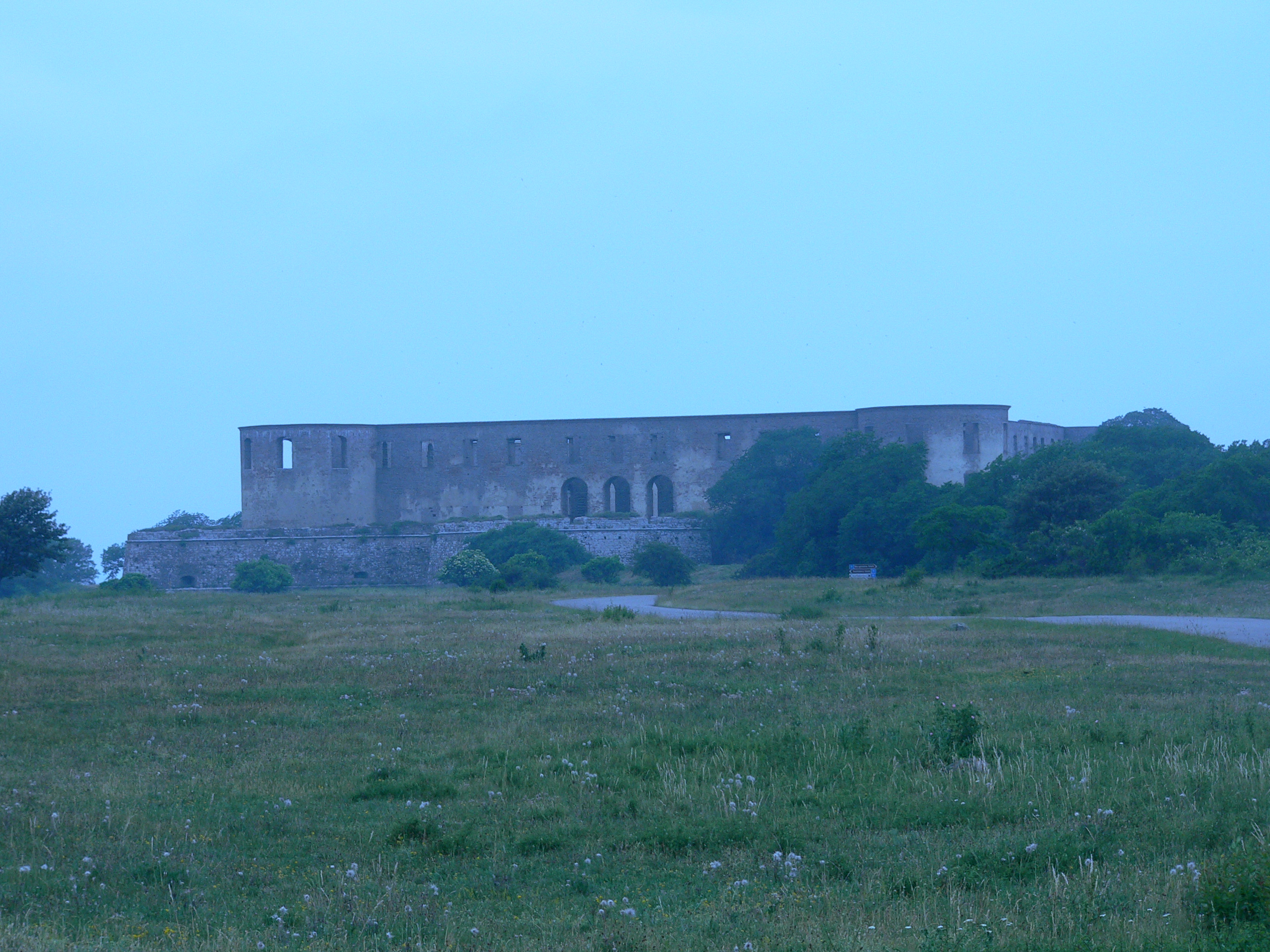 En bild av Borgholms slottsruin på Öland